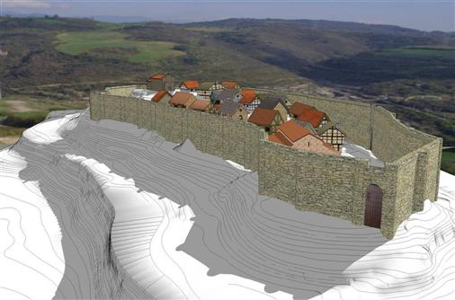 Reconstrucción de la muralla de la villa de Salinas de Añana en el siglo XII